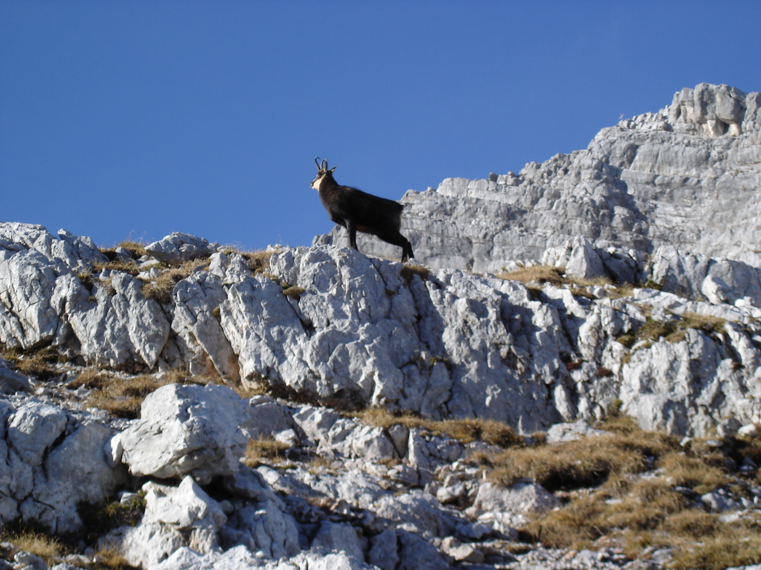 Gemse im Spätherbst, Leoganger Steinberge, Tirol